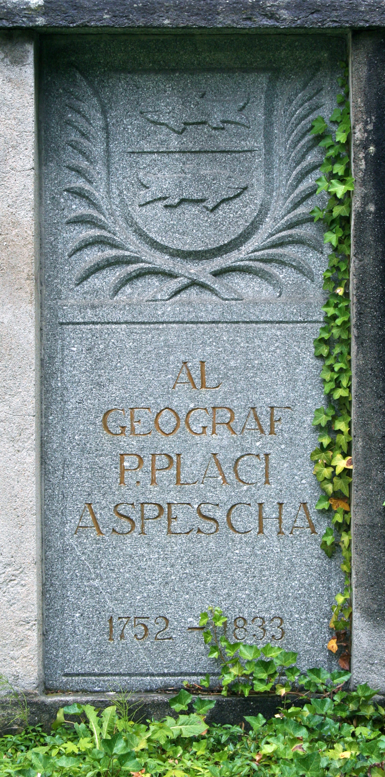 Gedenktafel für